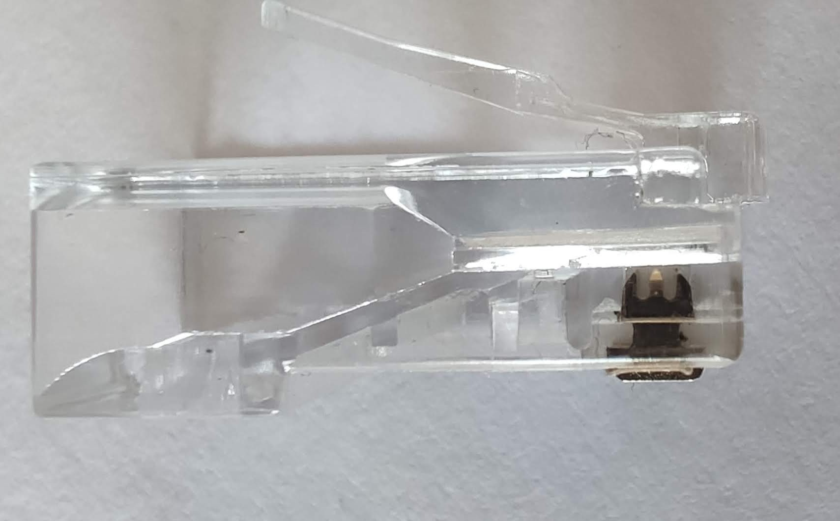 Konektor 8P8C (RJ-45) má pro pevný vodič typu drát nože ve tvaru písmene Ψ, kde je střední hrot mírně vyosen, takže při nalisování (nakrimpování) sklouzne střední hrot po vodiči na druhou stranu, než další dva. Obvykle je možné tento typ konektoru použít i pro lanko, protože spojení bude kvalitní (hroty se zapřou do lanka, nedojde k dodatečnému vyosení) a nedojde k poškození elektrického spojení.